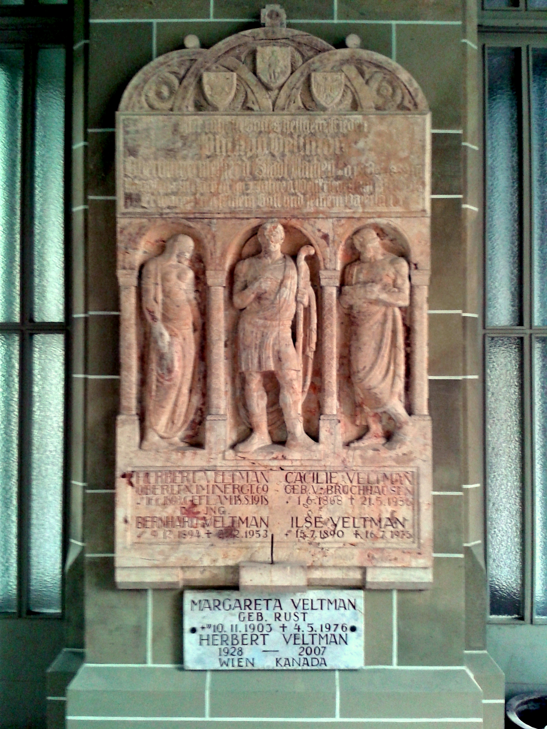 Grabstätte der Familie Veltman, Aachen, im Campo Santo auf dem Westfriedhof II